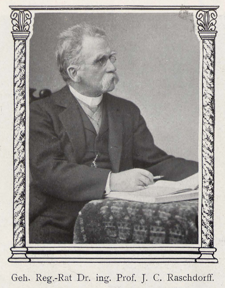 Julius Carl Raschdorff (1823-1914), deutscher Architekt und Hochschullehrer. Schöpfer des Berliner Doms.